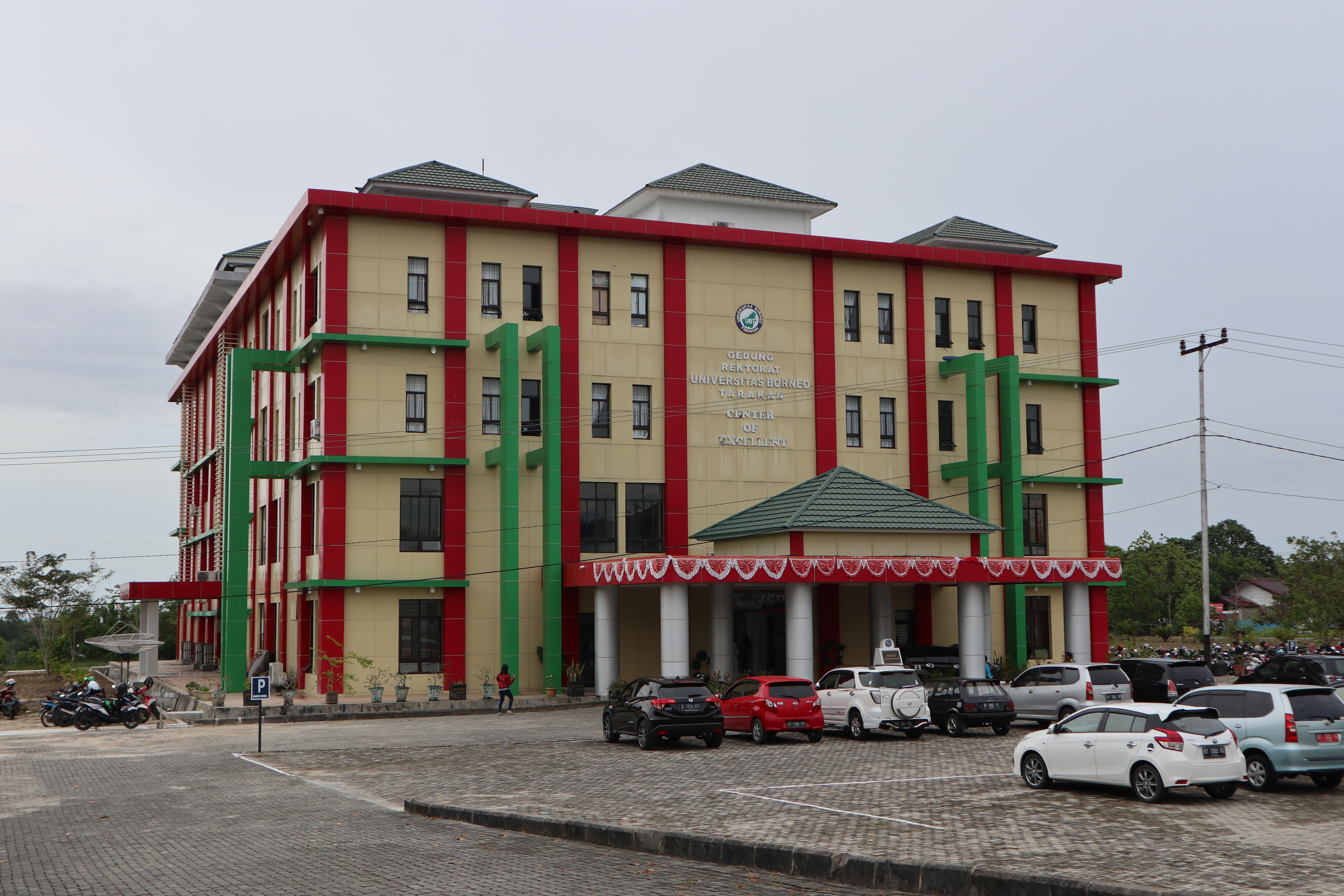 Gedung Rektorat Universitas Borneo Tarakan.